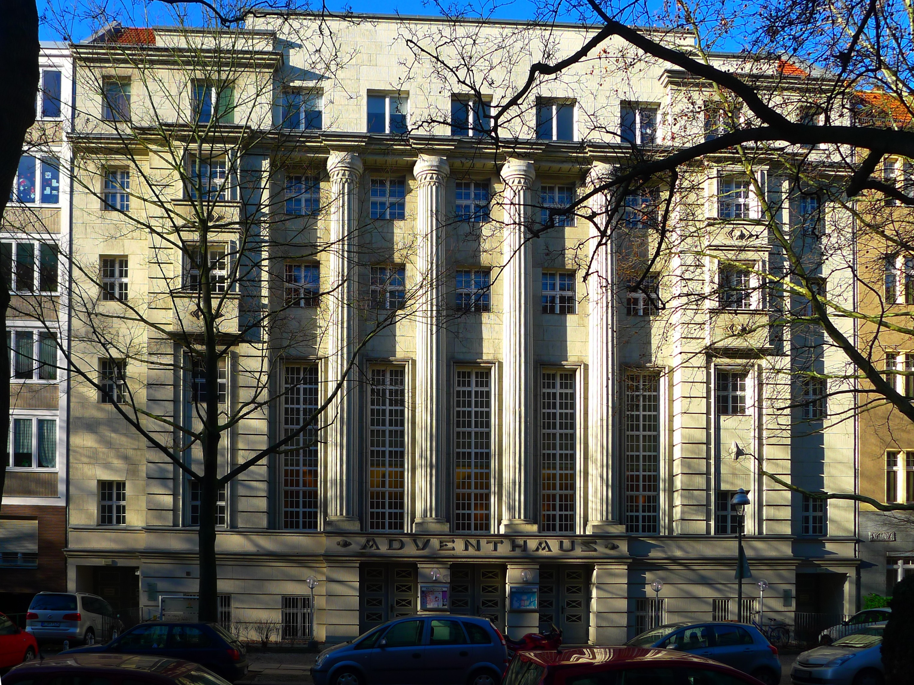 Fassade des Adventhauses